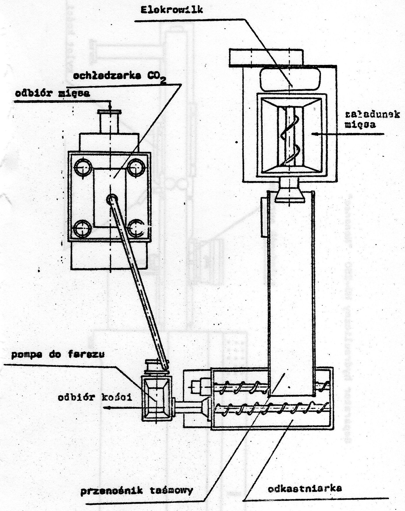 Linia do mechanicznego odmięśniania kości Beehive AUX-70 Stinger. Pierwsze w Polsce urządzenie do produkcji MOM z mięsa zwierząt rzeźnych (1976).